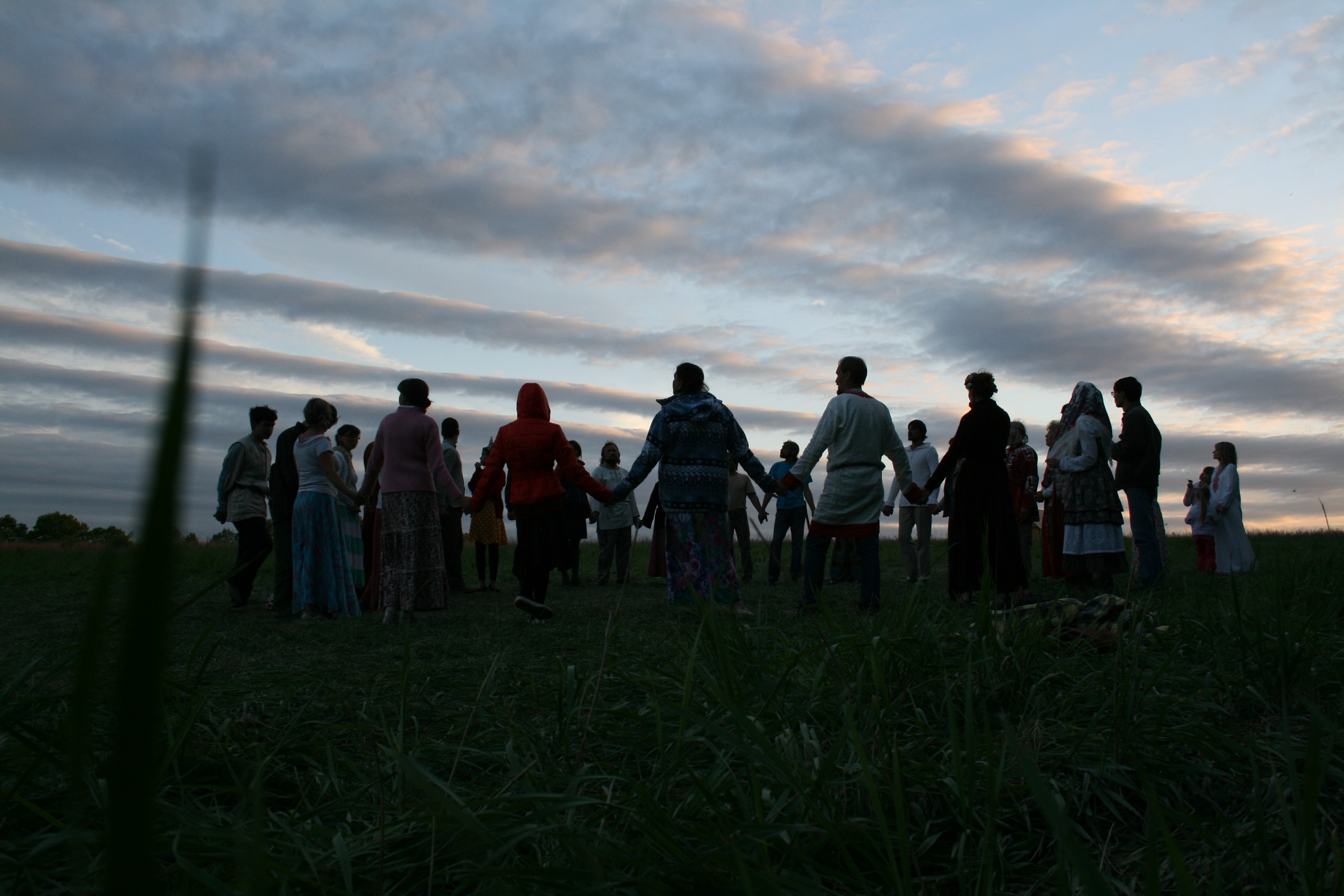 Хоровод в родовом экопоселении «Кореньские родники». Белгородская область 2014.